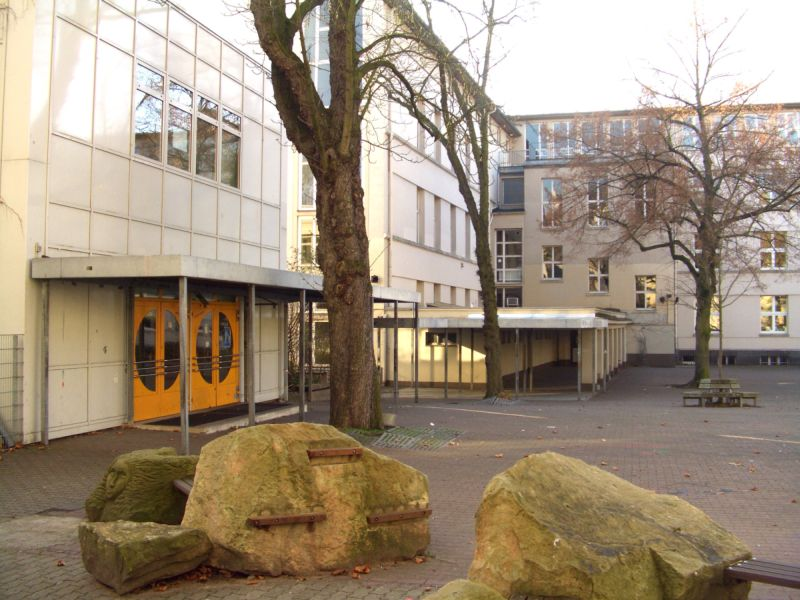 Helmholtzschule in Frankfurt am Main. Links, der in den 1990er Jahren sanierte Neubau, hinten das Hauptgebäude.